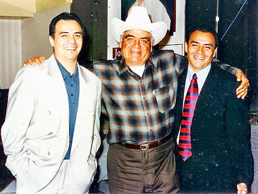 Alejandro tuvo un hermano gemelo, llamado Enrique (DEP).